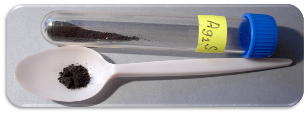 Sulfid stříbrný - Ag2S